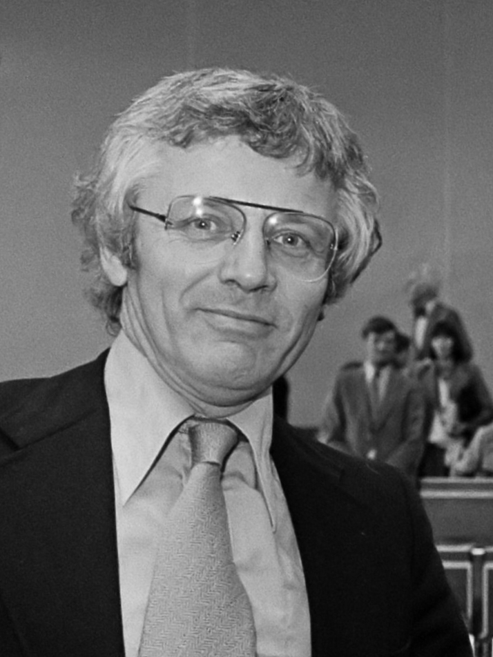 Minister Gardeniers van CRM deelt toneelprijzen uit; vln Eric van der Donk , Mary Dresselhuys en minister Gardeniers 22 mei 1978